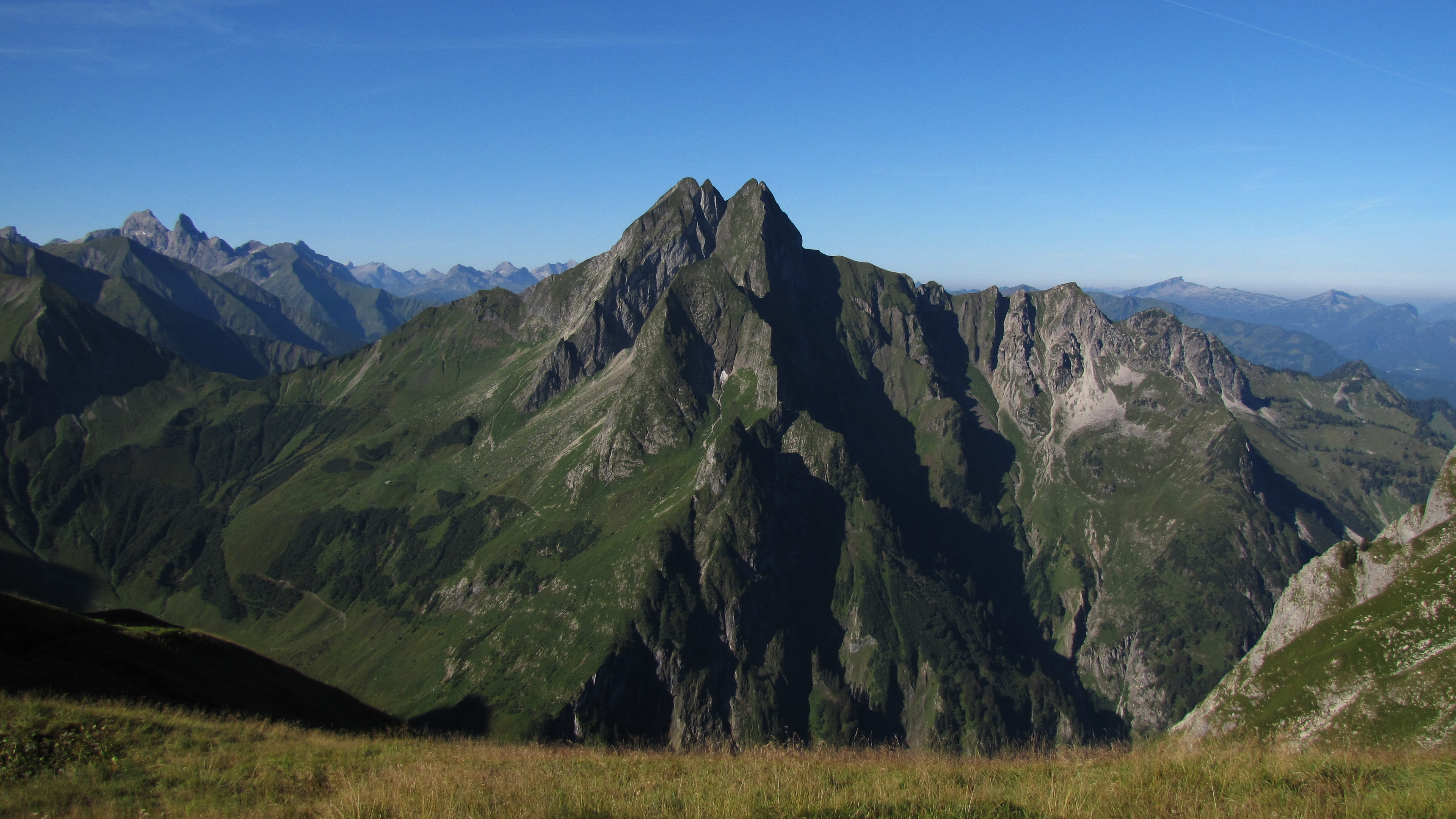 Blick vom Himmelecksattel (2007 m) nach Südwesten zur Höfats (2259 m).